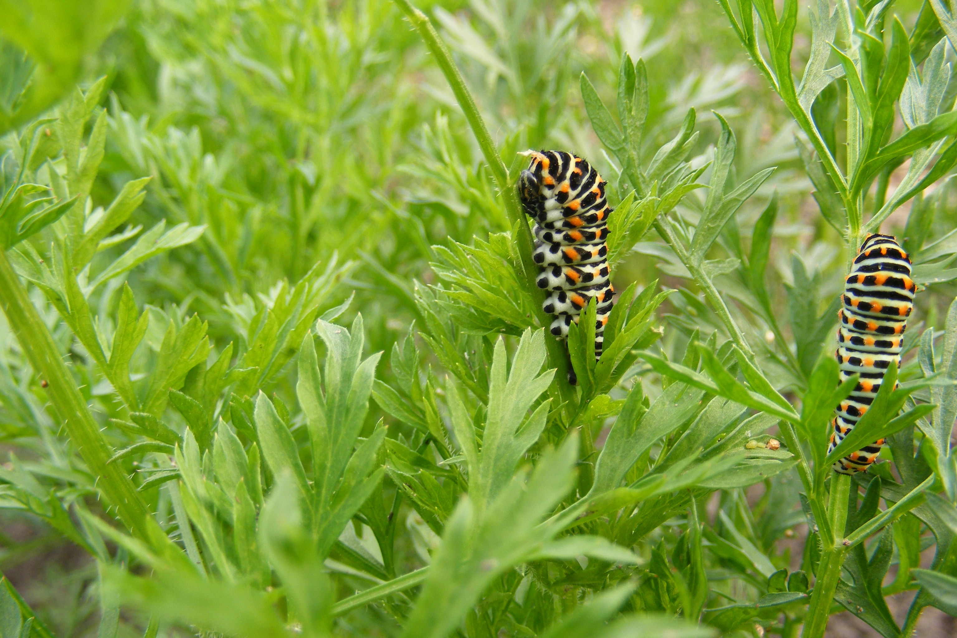 Rupsen van de koninginnepage op wortelloof bij een biotuinder